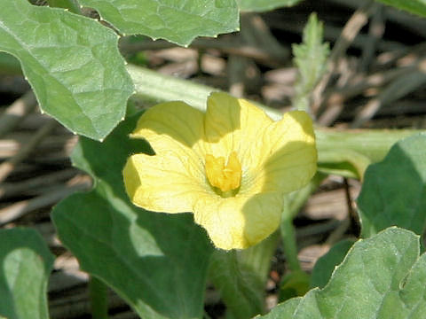 Citrullus lanatus